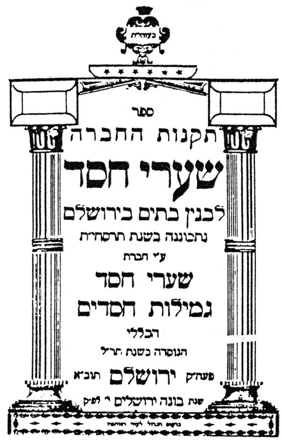 שער פנקס גמ"ח הכללי